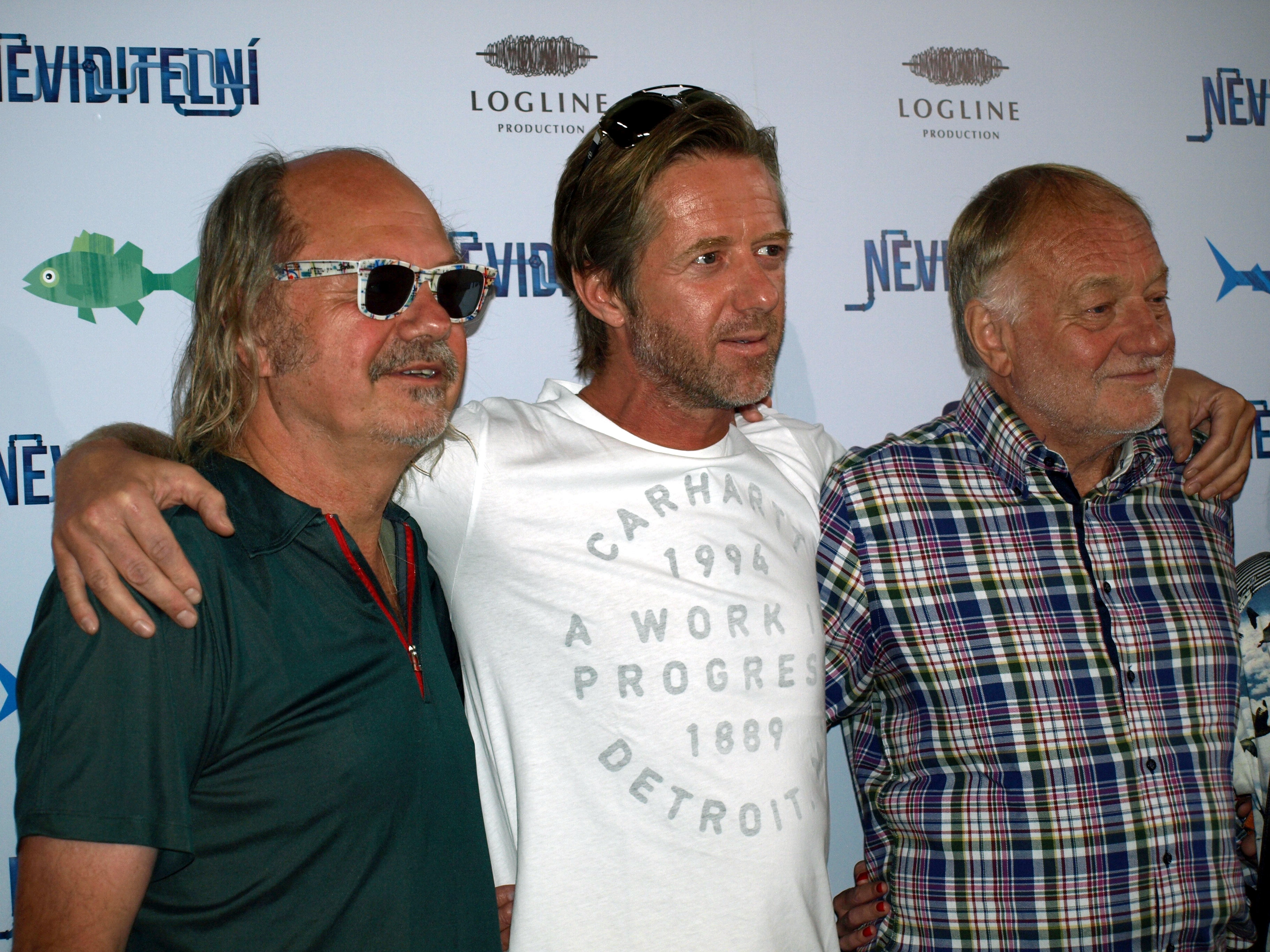 Fotky z novinářské konference z 24.7.2014- - Autor Blanka Borová pro & 10Mpix.cz